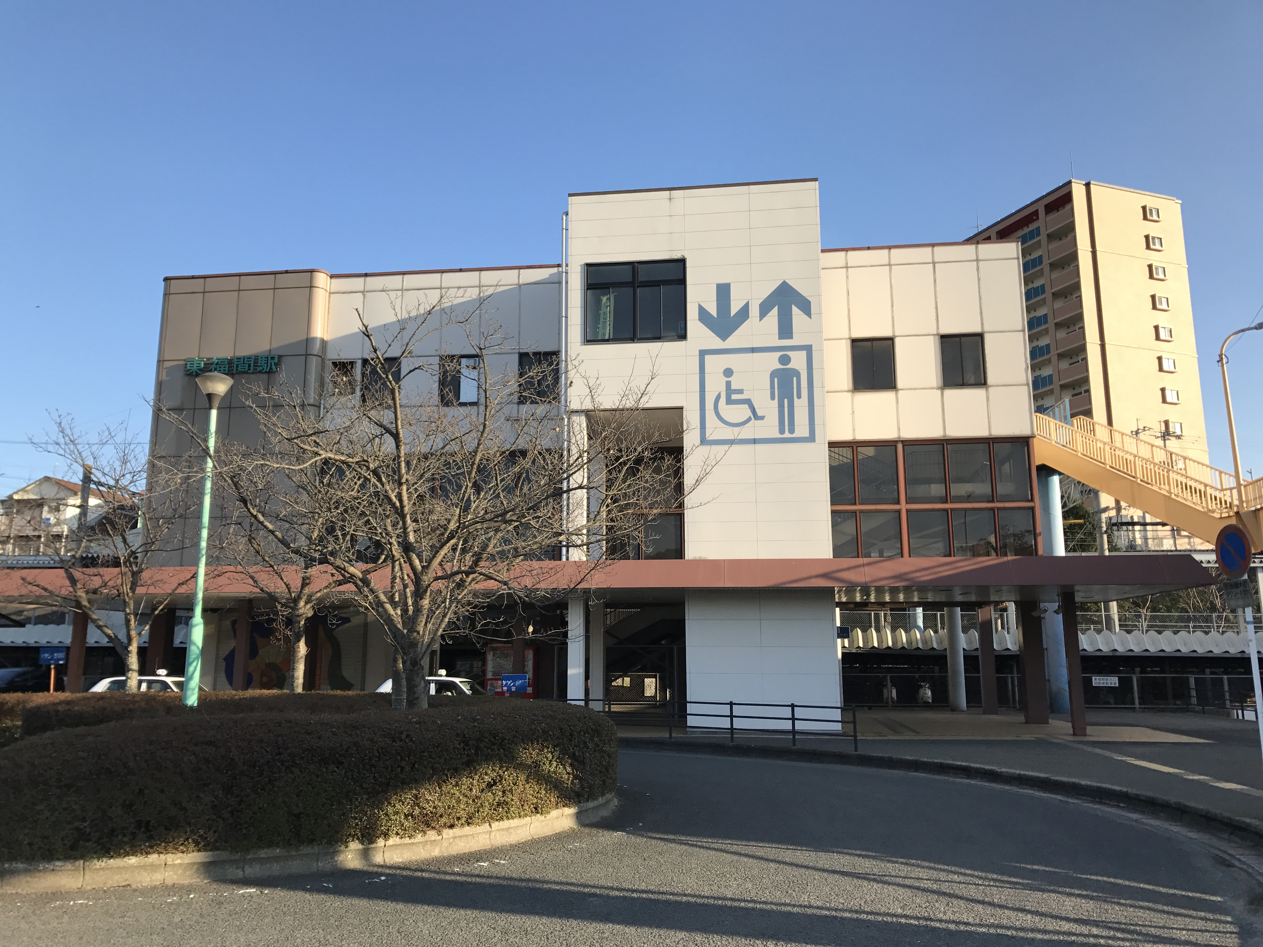 東福間駅駅舎